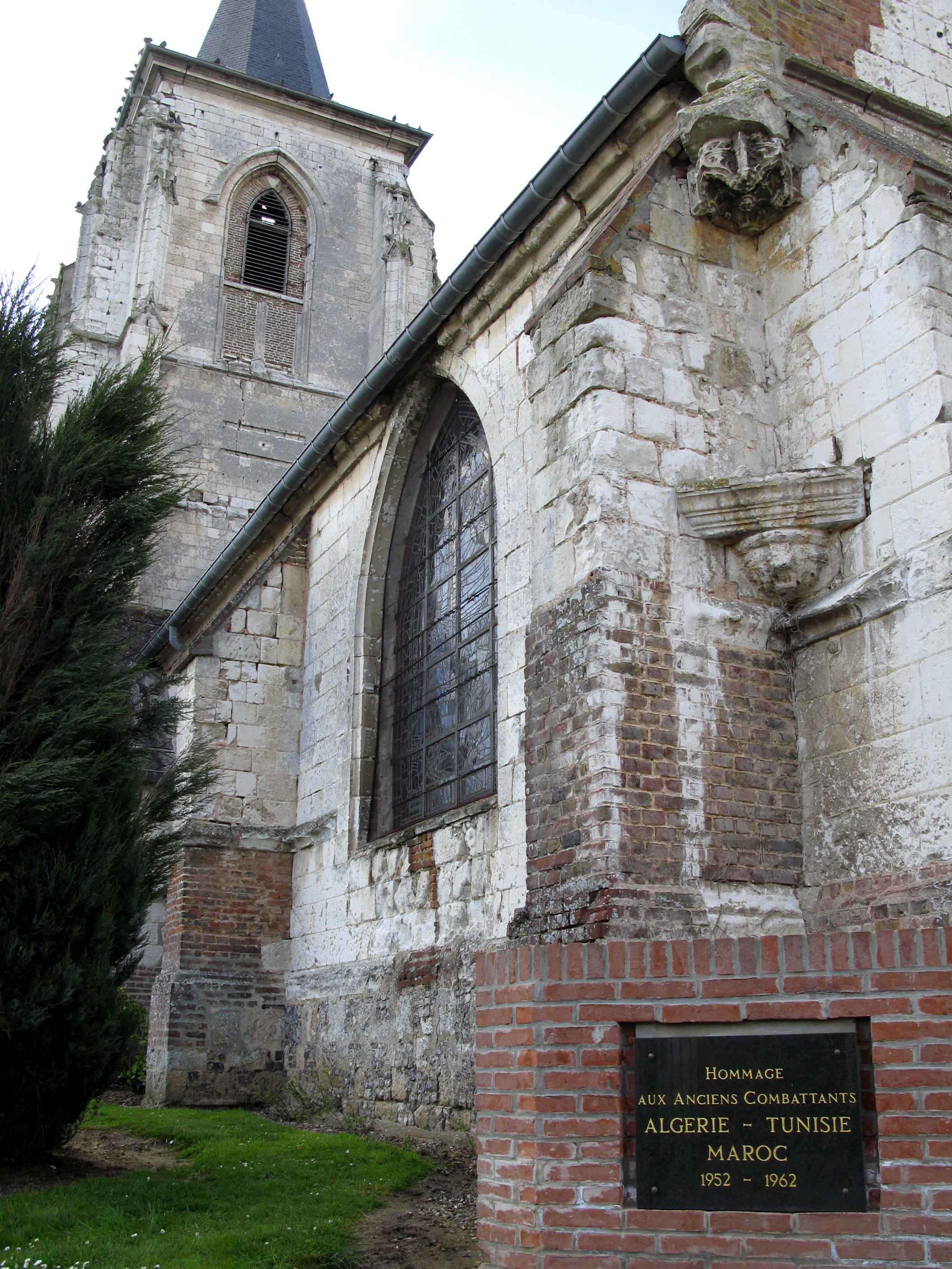 Franleu (Somme, France) - La stèle en mémoire des anciens combattants en Algérie, Tunise et Maroc.